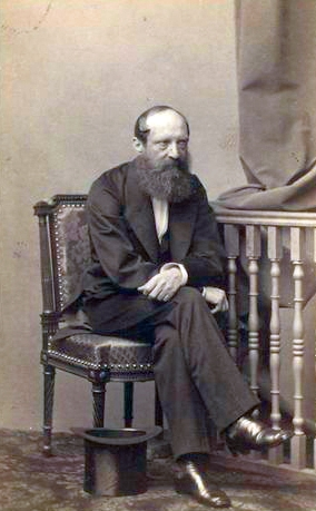 Куторга, Михаил Семёнович